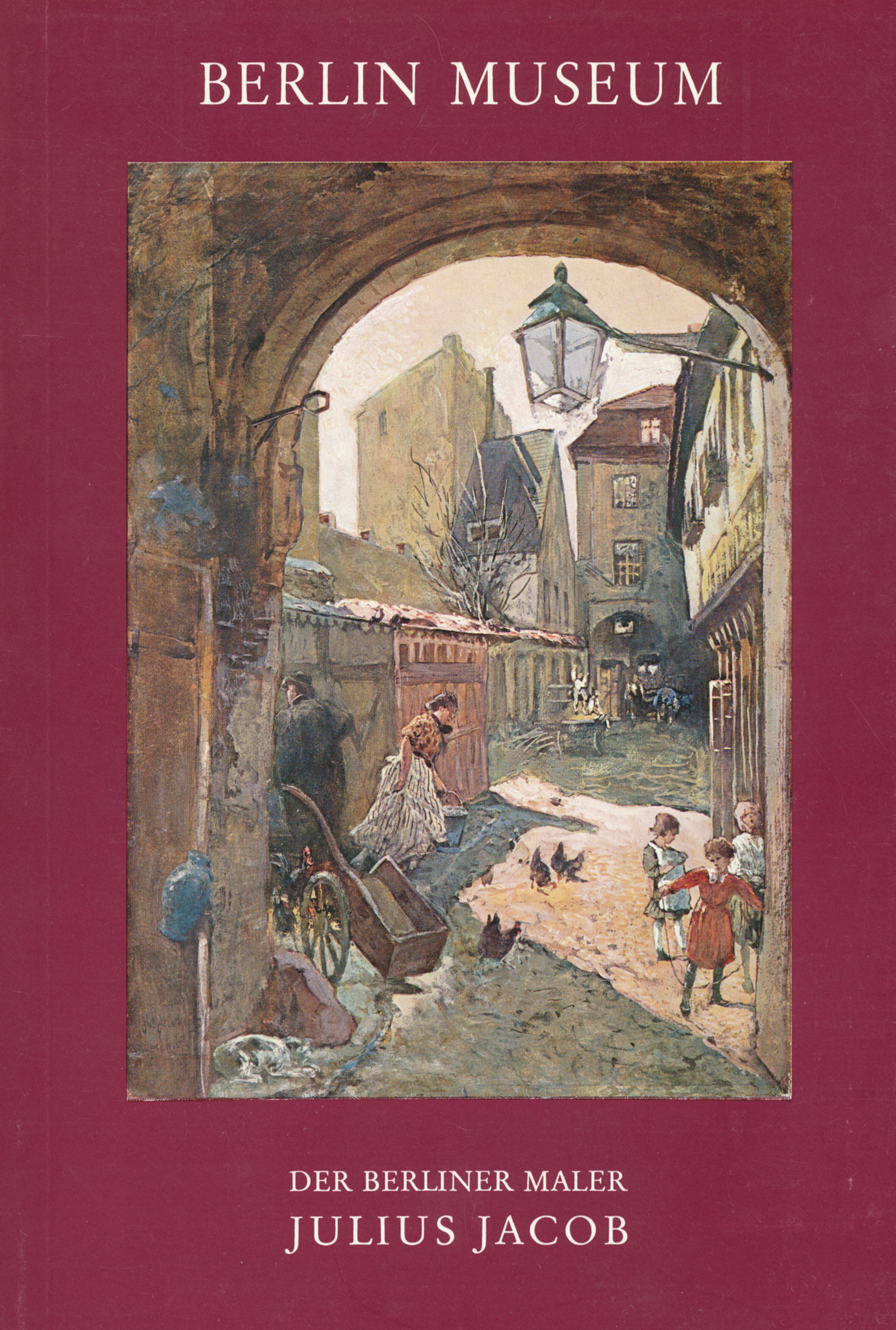 Julius Jacob, Blick in den Krögel, Aquarell 1883, Stiftung Stadtmuseum Berlin